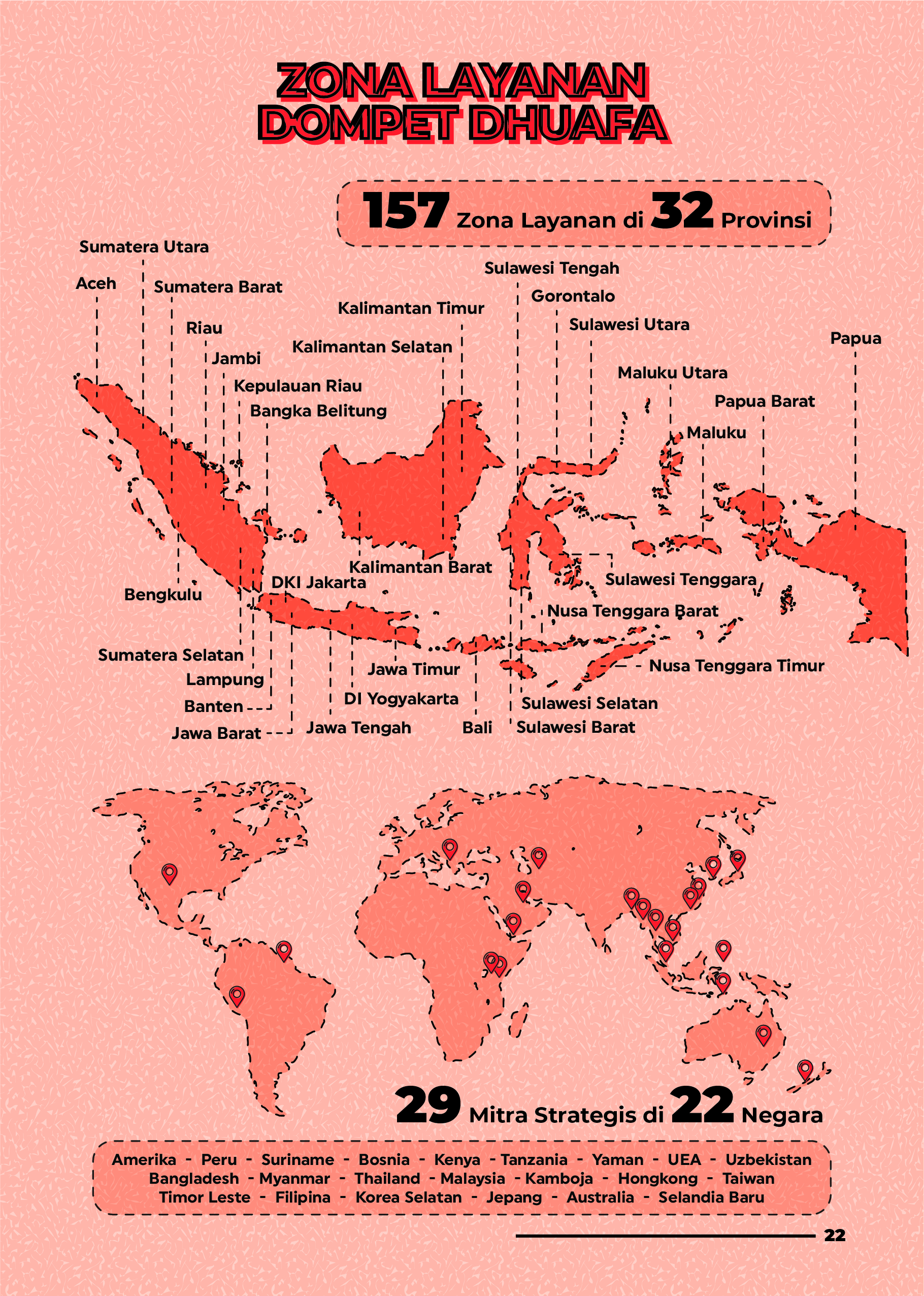 Zona Layanan Dompet Dhuafa